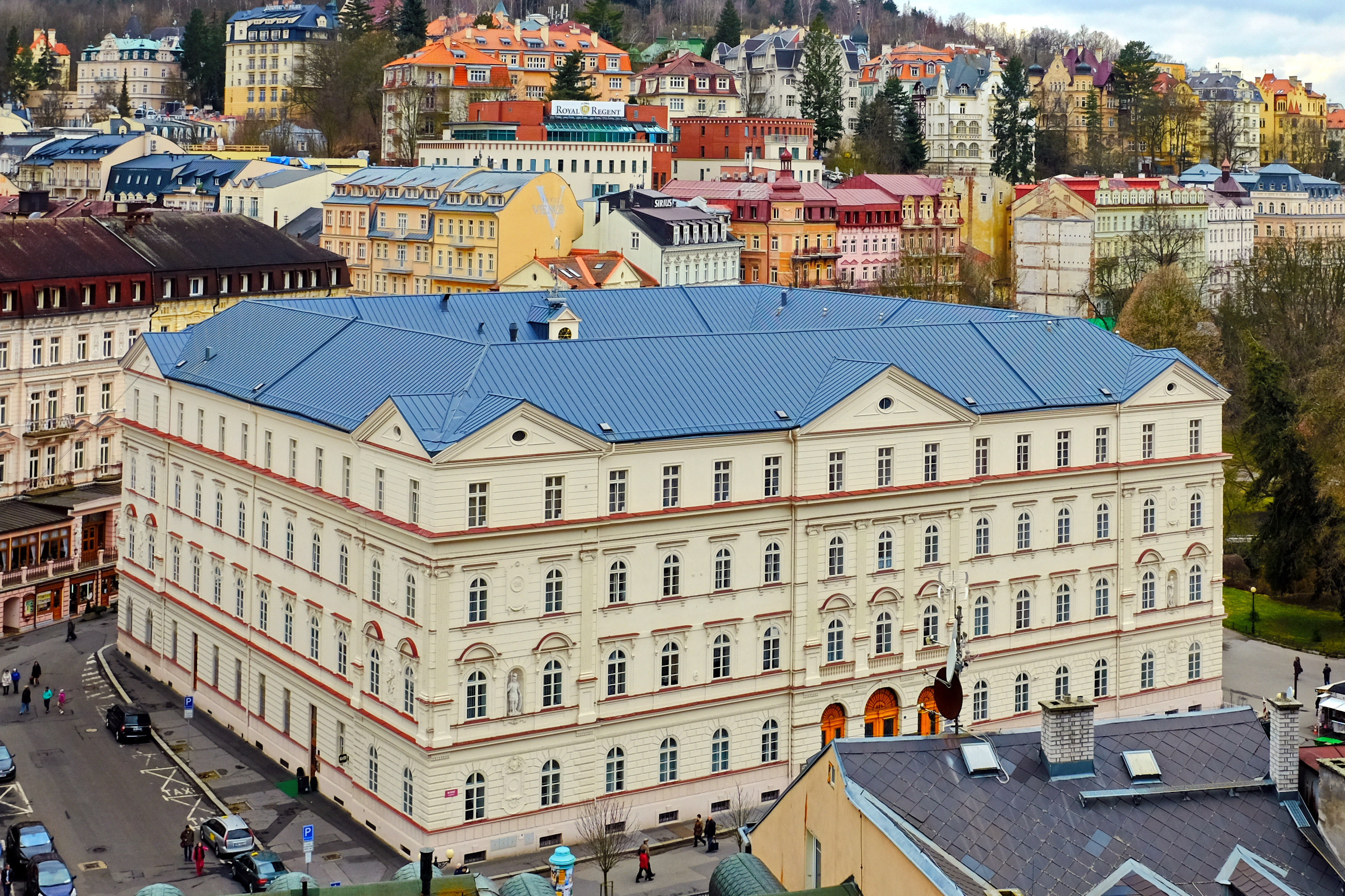 Vojenský lázeňský ústav, Mlýnské nábřeží 574/7, Karlovy Vary.